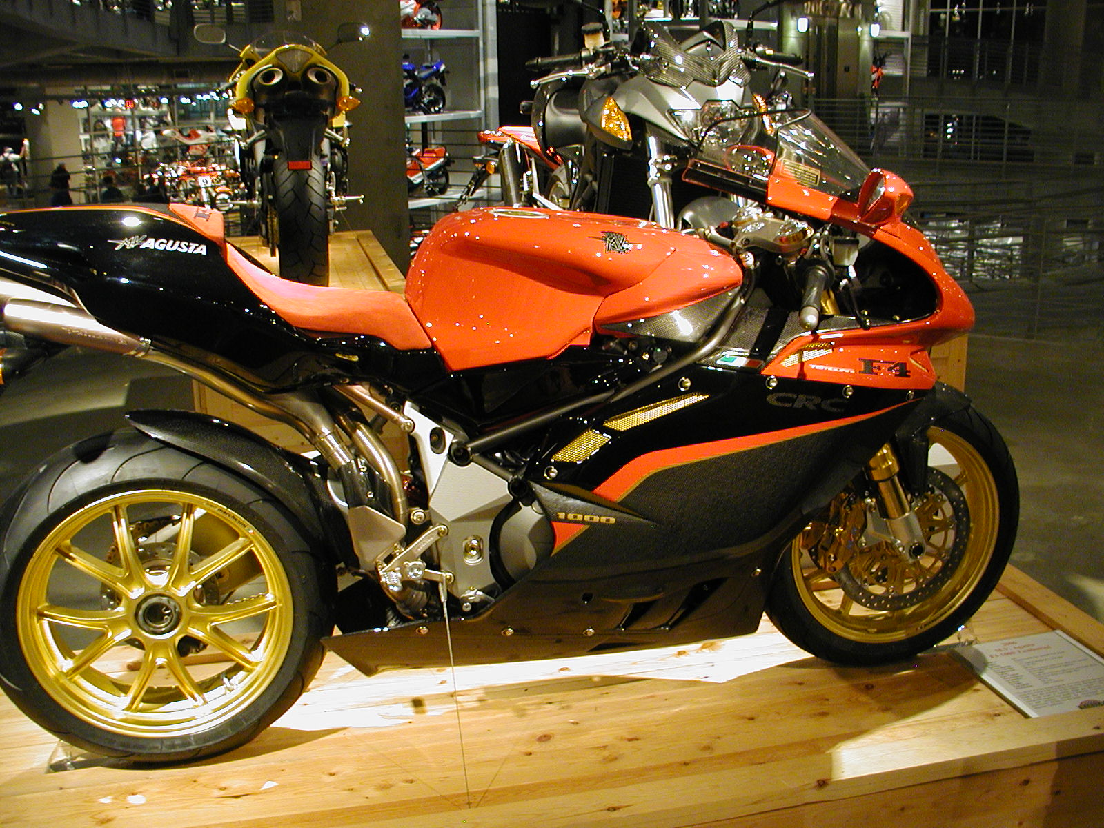 MV Agusta F4 1000 Tamburini